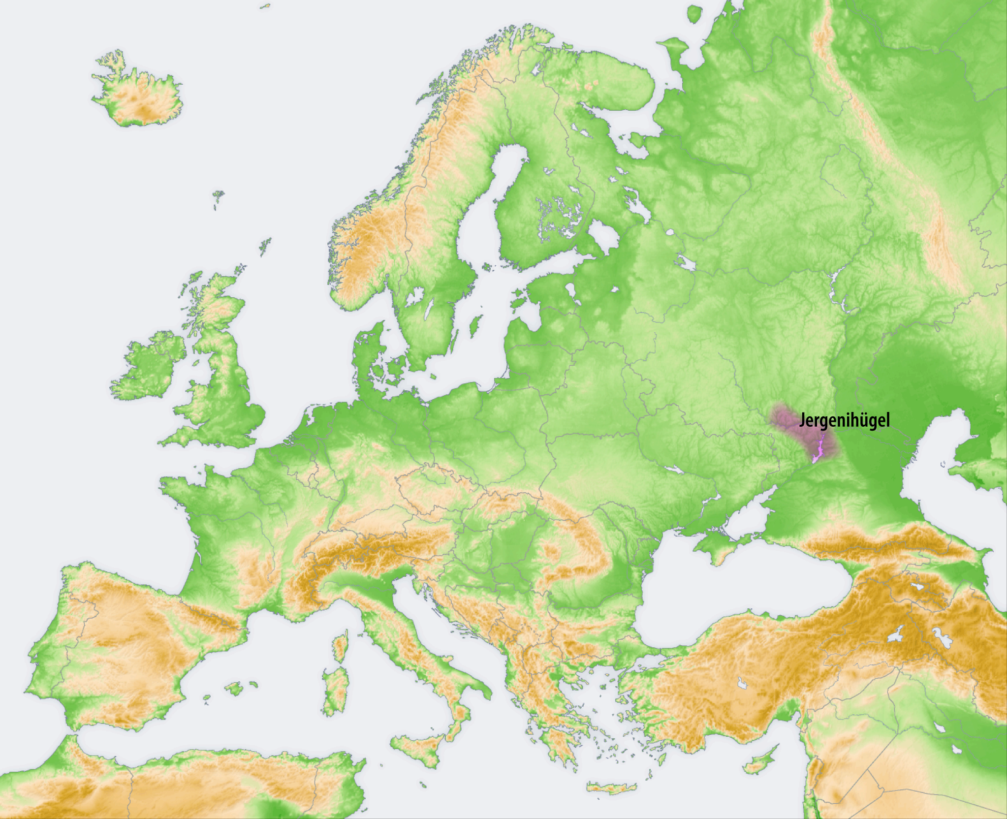 Landschaften der Osteuropäischen Ebene: Jergenihügel